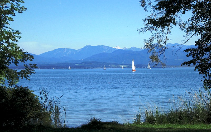 Chiemsee - Bayern - Deutschland